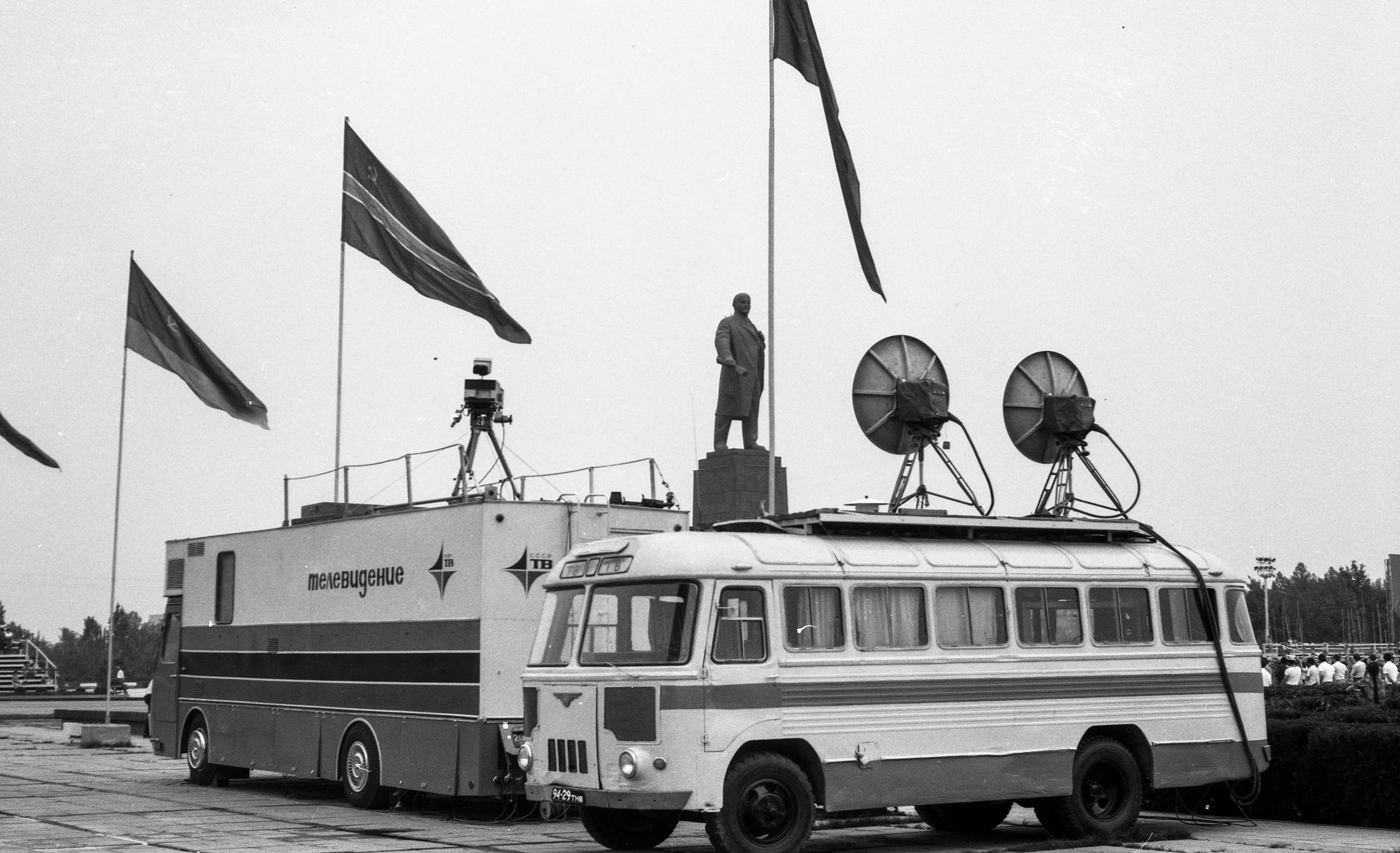 Függetlenség (Lenin) tér. Location: Uzbekistan Tags: Soviet Union, bus, aerial, satellite, television camera, Lenin portrayal, sculpture, broadcast van Title: Függetlenség (Lenin) tér.